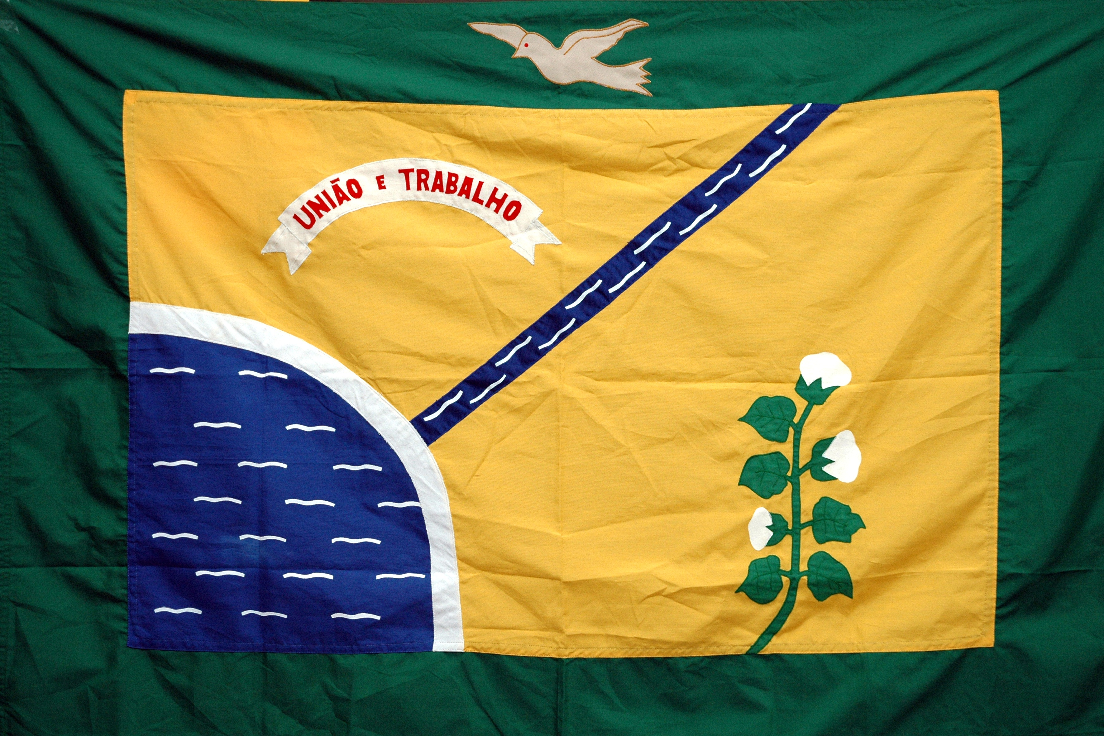 Municipio de pernambuco